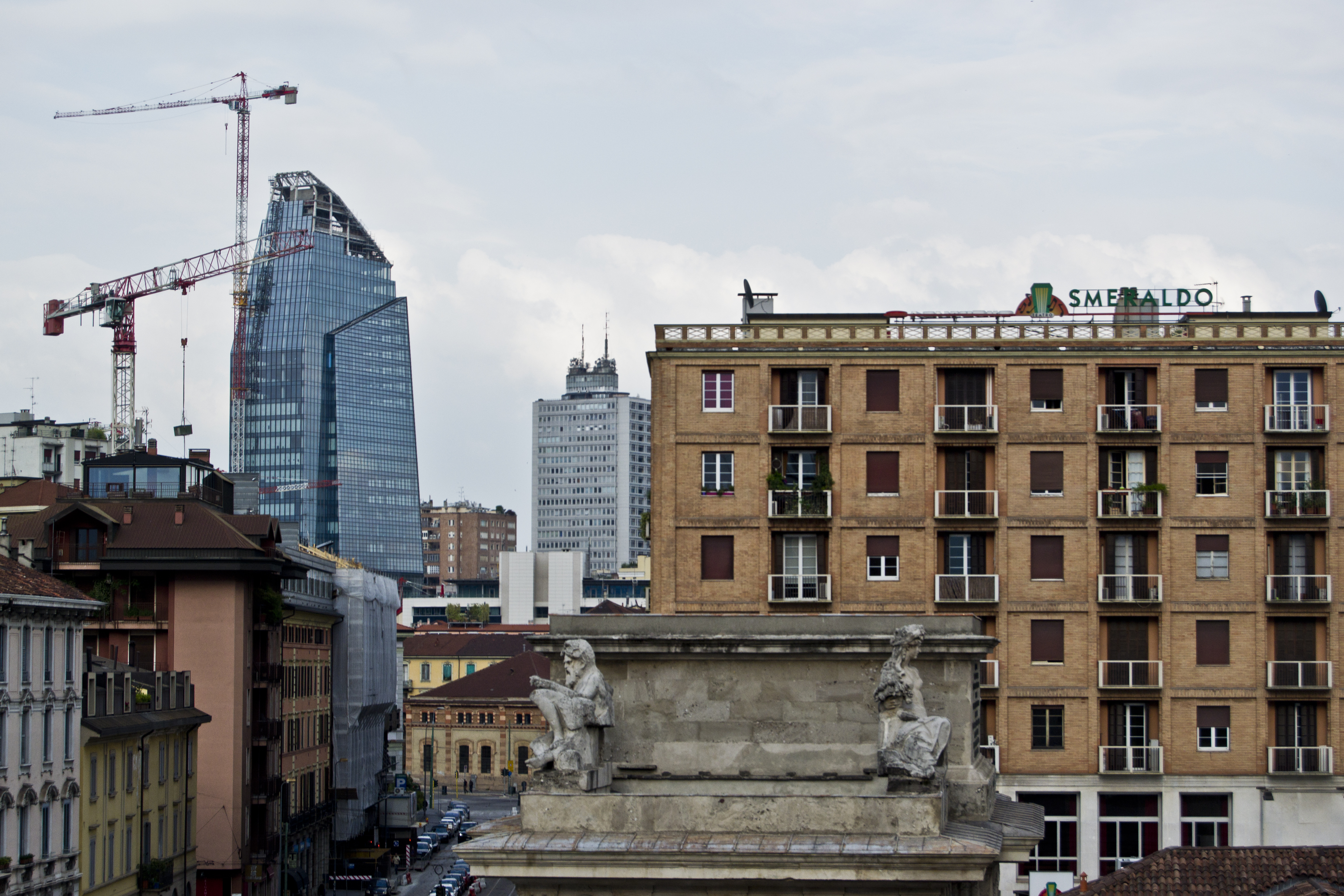 Piazza 25 Aprile, Milano, al 3 Giugno 2012